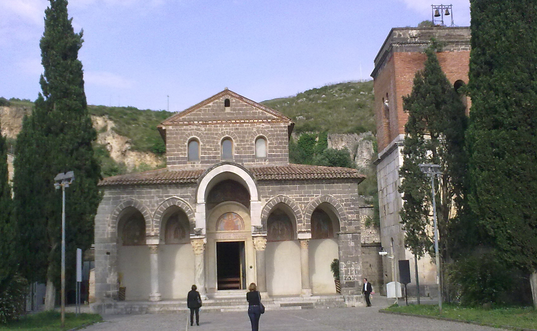 Abbazia di Sant'Angelo in Formis, Capua. Facciata e campanile.